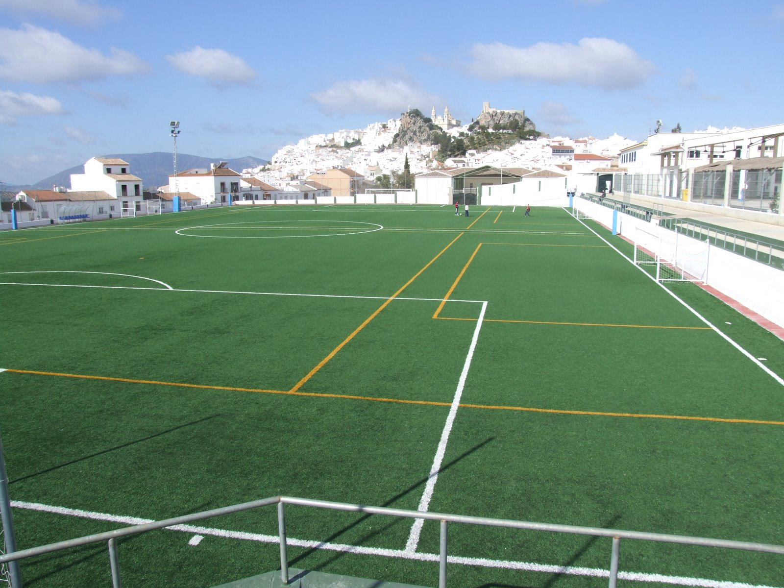 Campo de fútbol "Nuestra Señora de los Remedios", Olvera